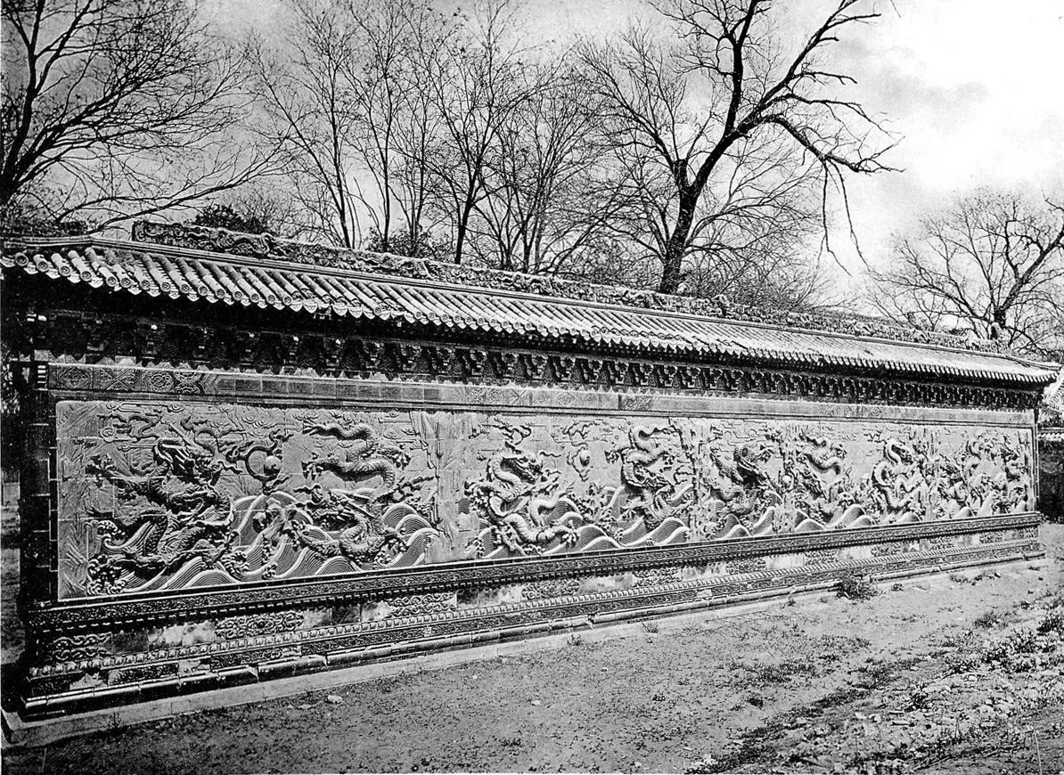 photo from Ein Tagebuch in Bildern